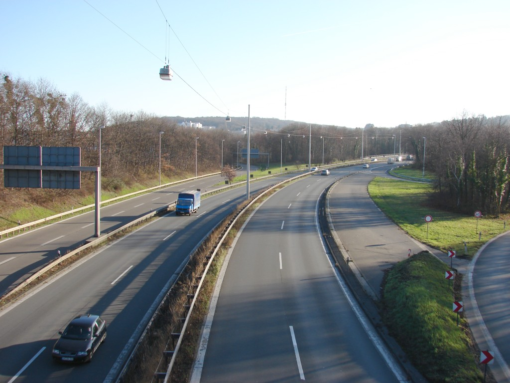 Bundesautobahn 565 in Bonn